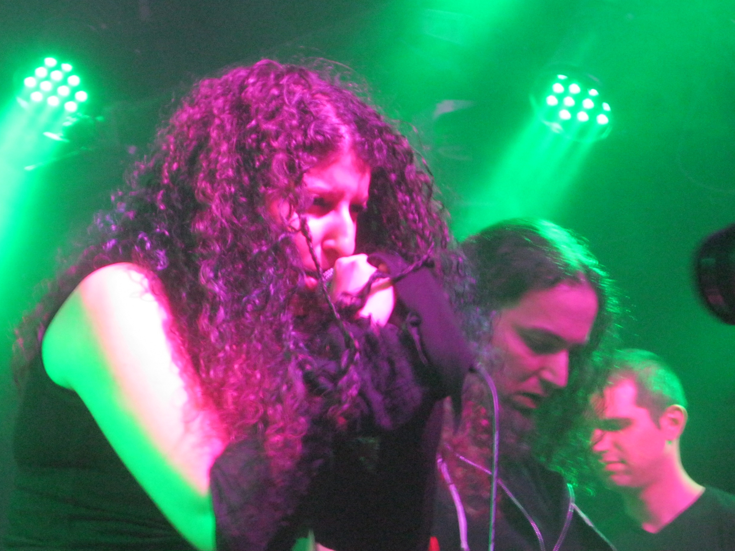 Orpheus Blade